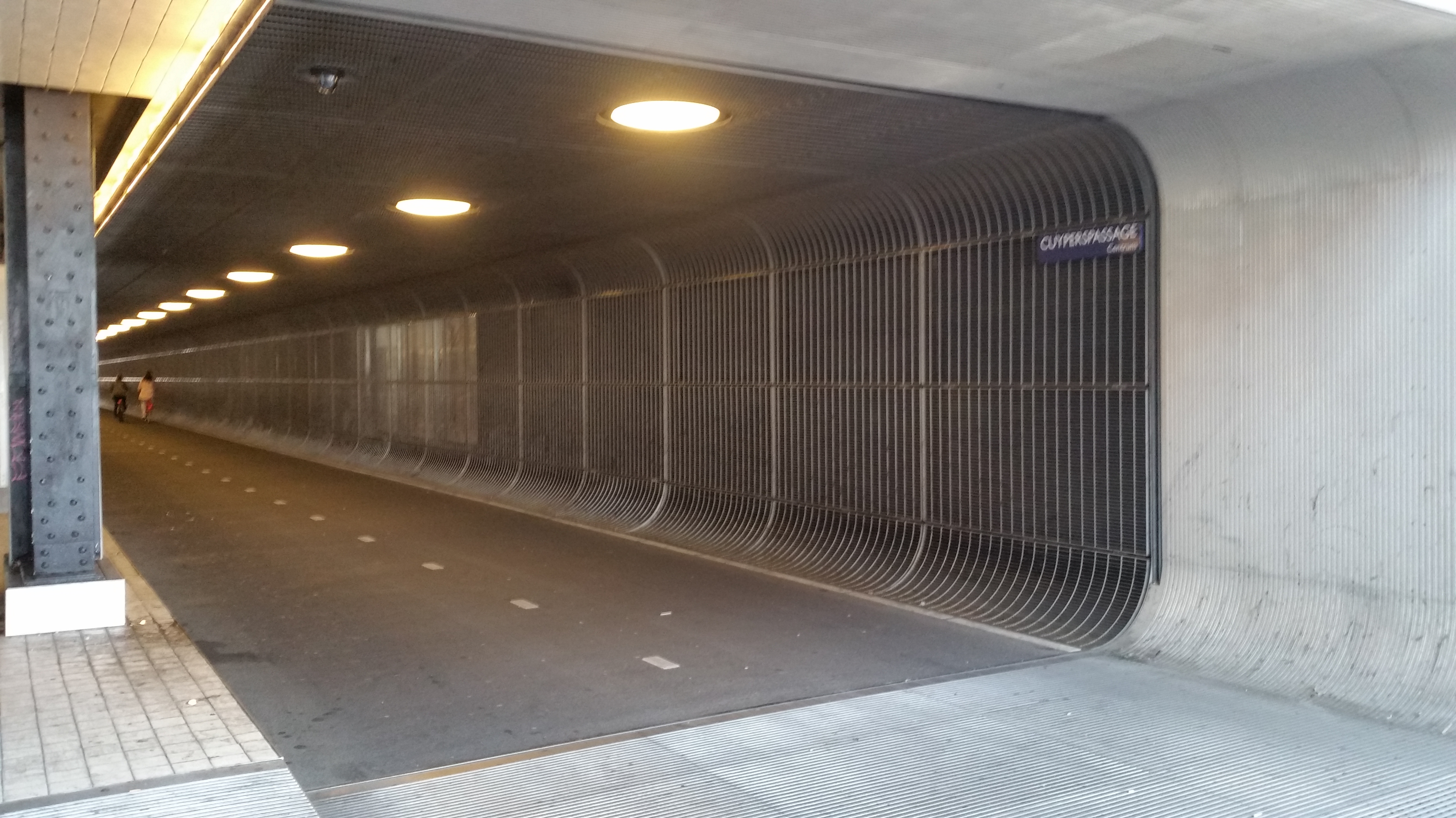 Noorderingang van de Cuyperspassage, Amsterdam